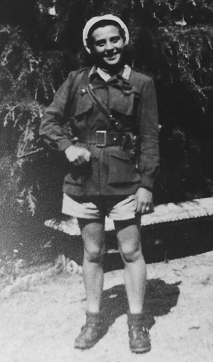 Partigiana